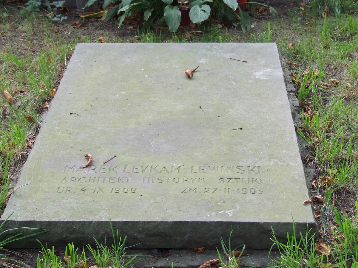 Marek Leykam, grób, Cmentarz Ewangelicko-Augsburski w Warszawie